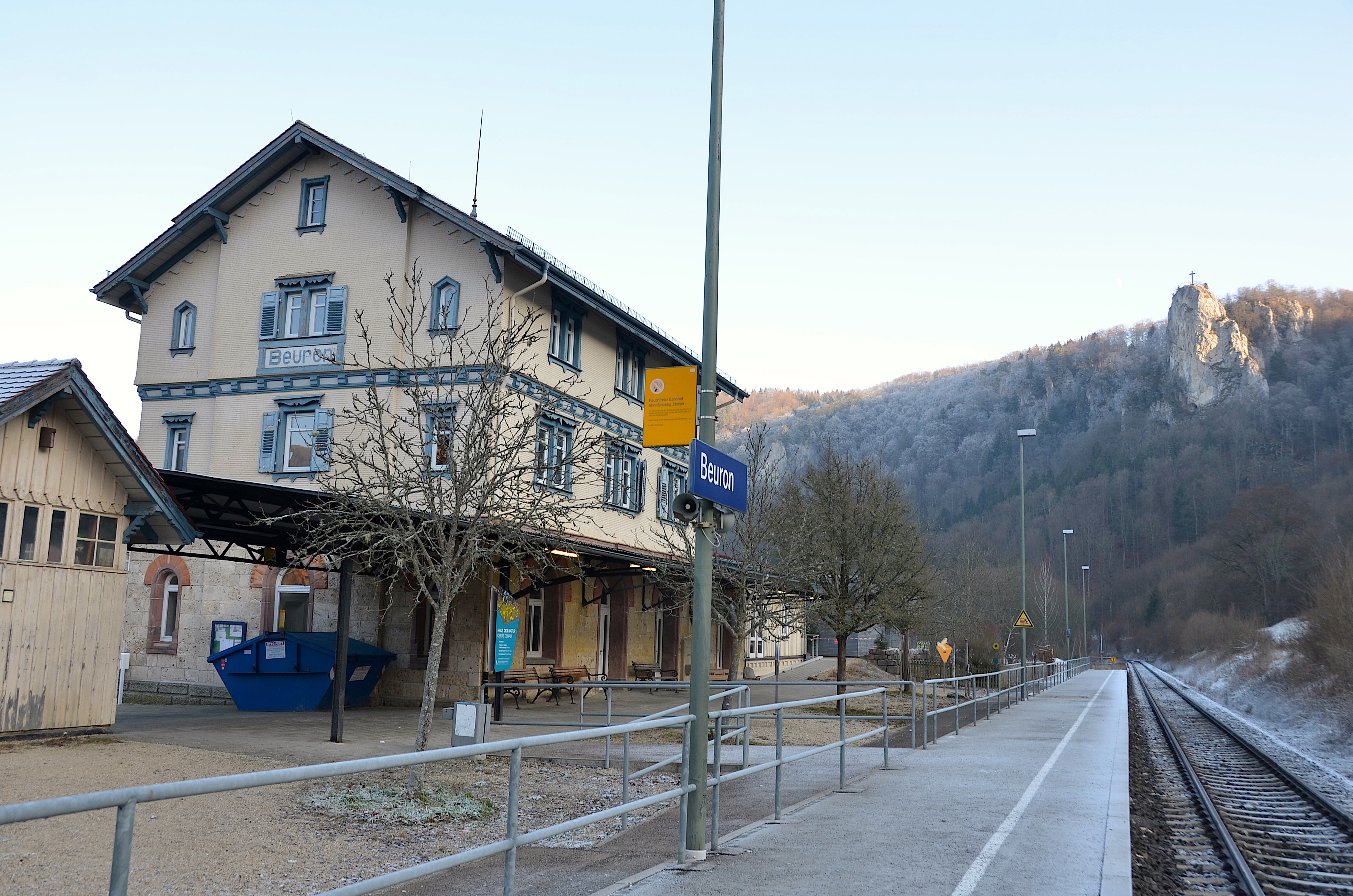 Bahnhof Beuron (heute Haus der Natur) in Baden-Württemberg